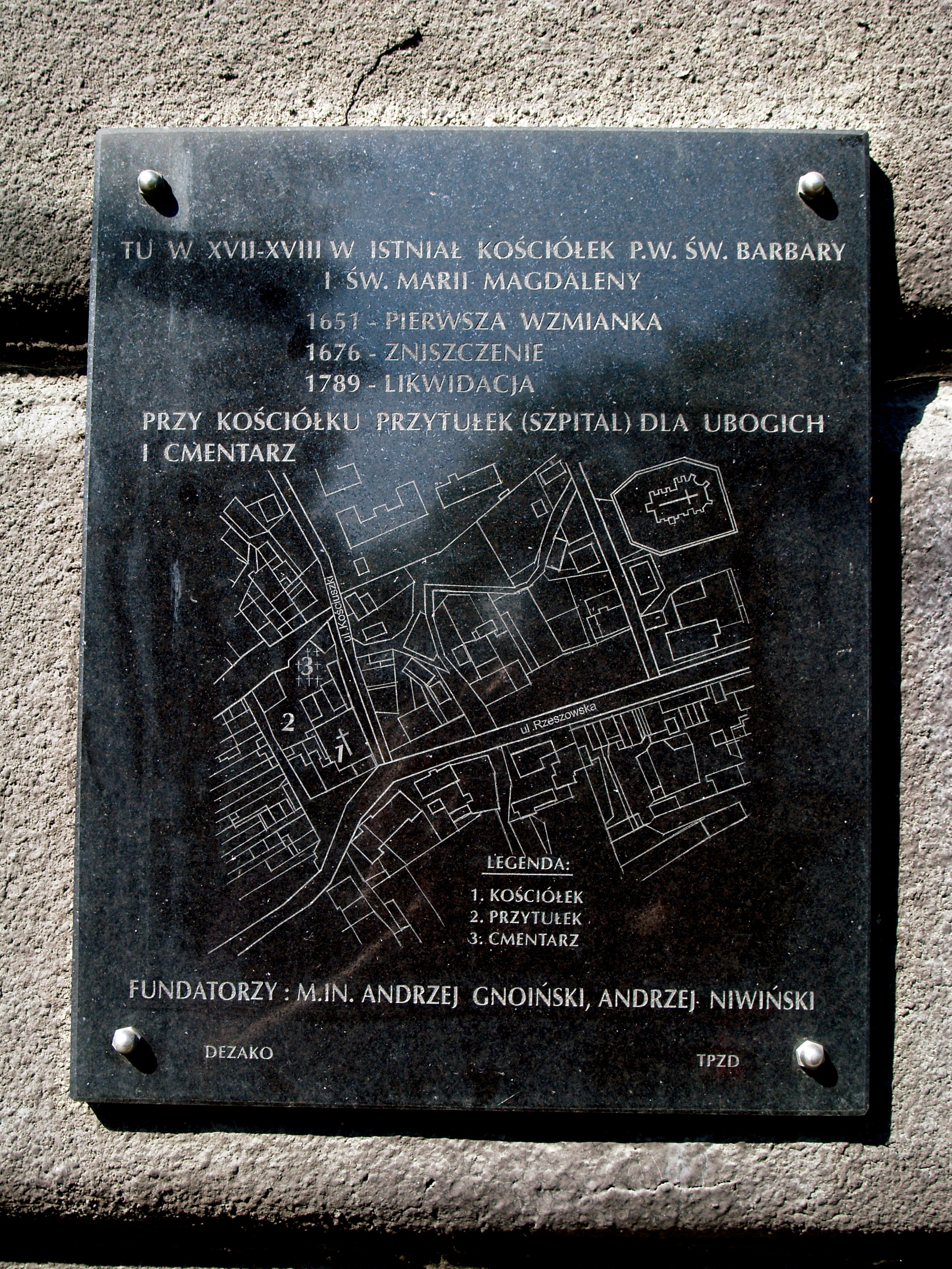 Tablica pamiątkowa w miejscu, w którym stał kościół św. Barbary w Dębicy